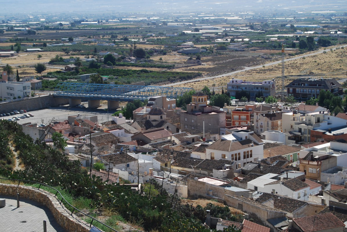 Vista de parte del casco urbano de Puerto Lumbreras y de la Iglesia Nuestra Señora del Rosario